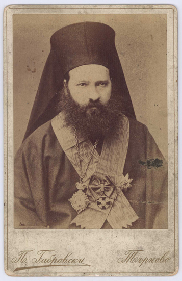 Васил Друмев (Климент Търновски): Чернобяла снимка на Васил Друмев (Климент Търновски) Велико Търново 1887